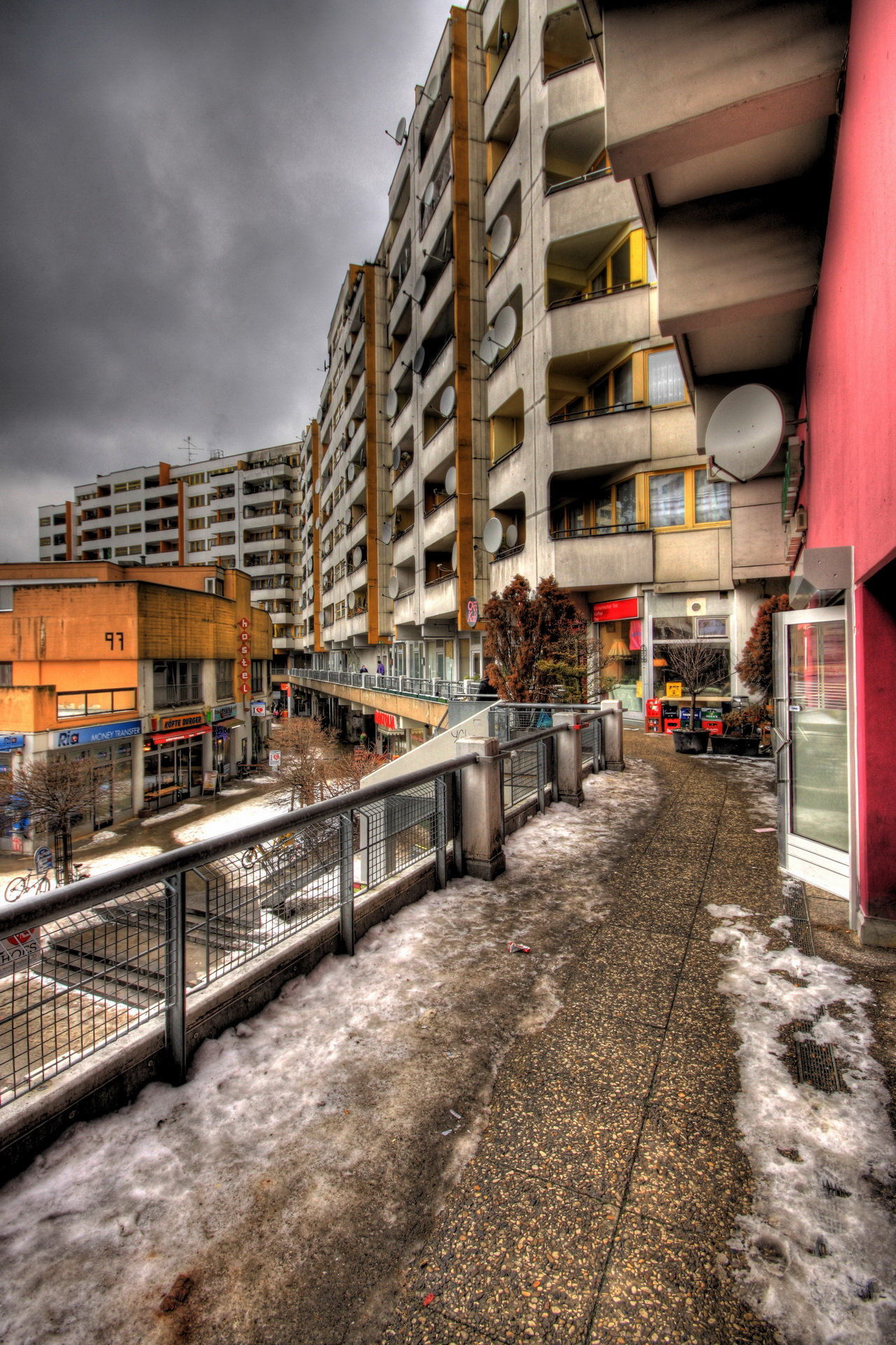 Januar 2010 am Kottbusser Tor